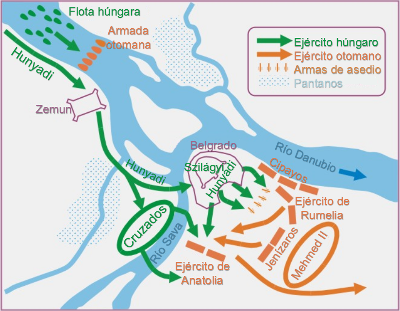 Sitio de Belgrado (1456)